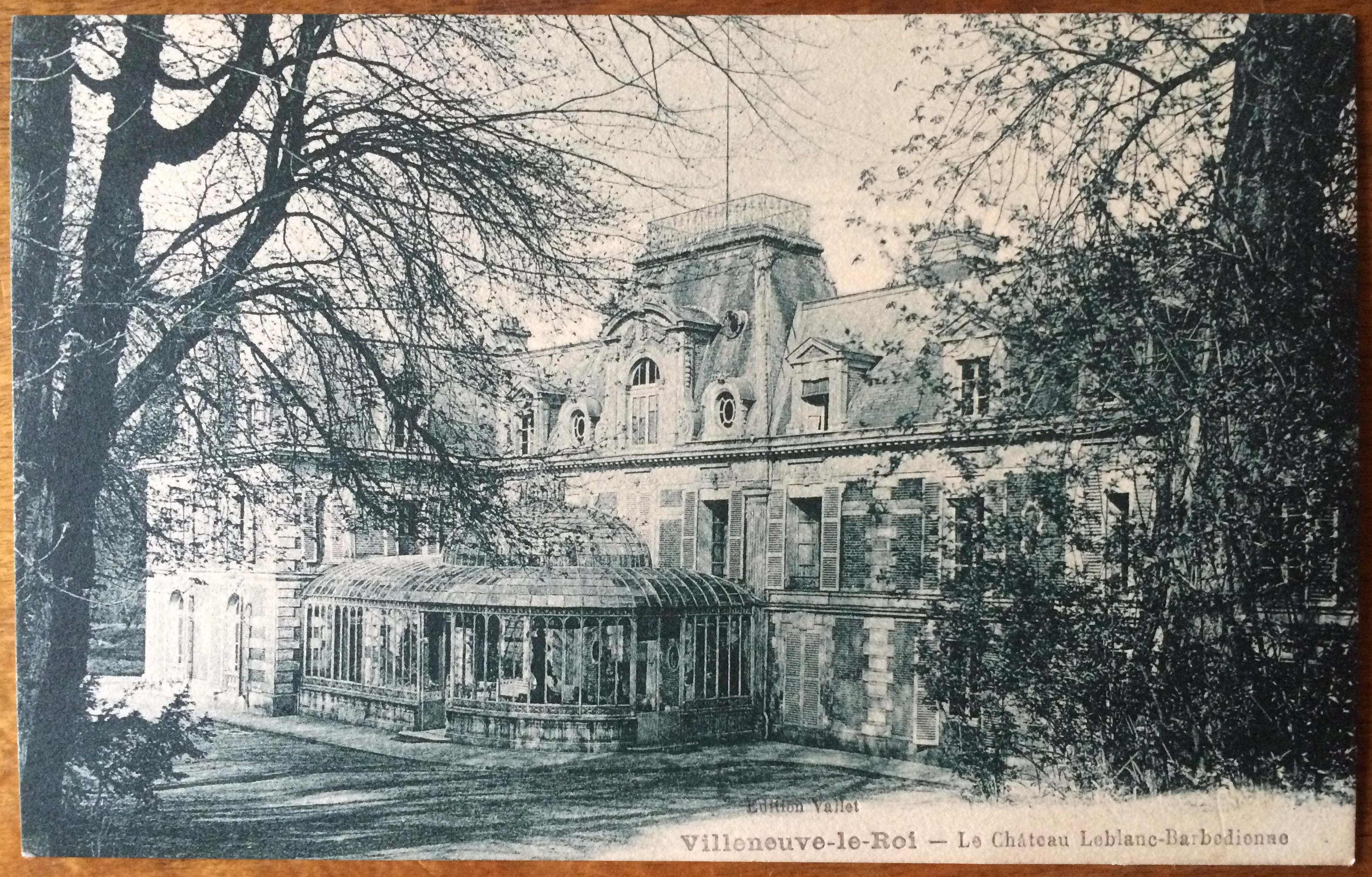 Carte postale du Château Leblanc-Barbedienne à Villeneuve-le-Roi (actuelle mairie, ancienne chartreuse médiévale).